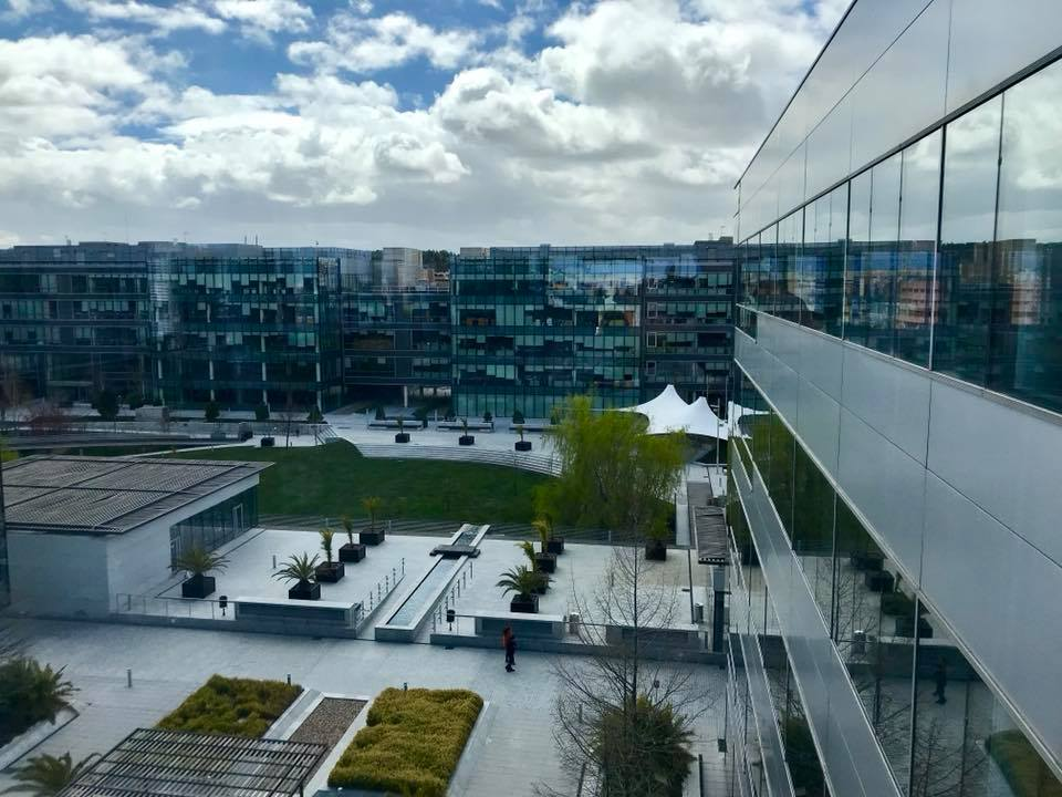 Vistas desde el edificio de Servicios Centrales de ENAIRE en el Parque Empresarial Las Mercedes.